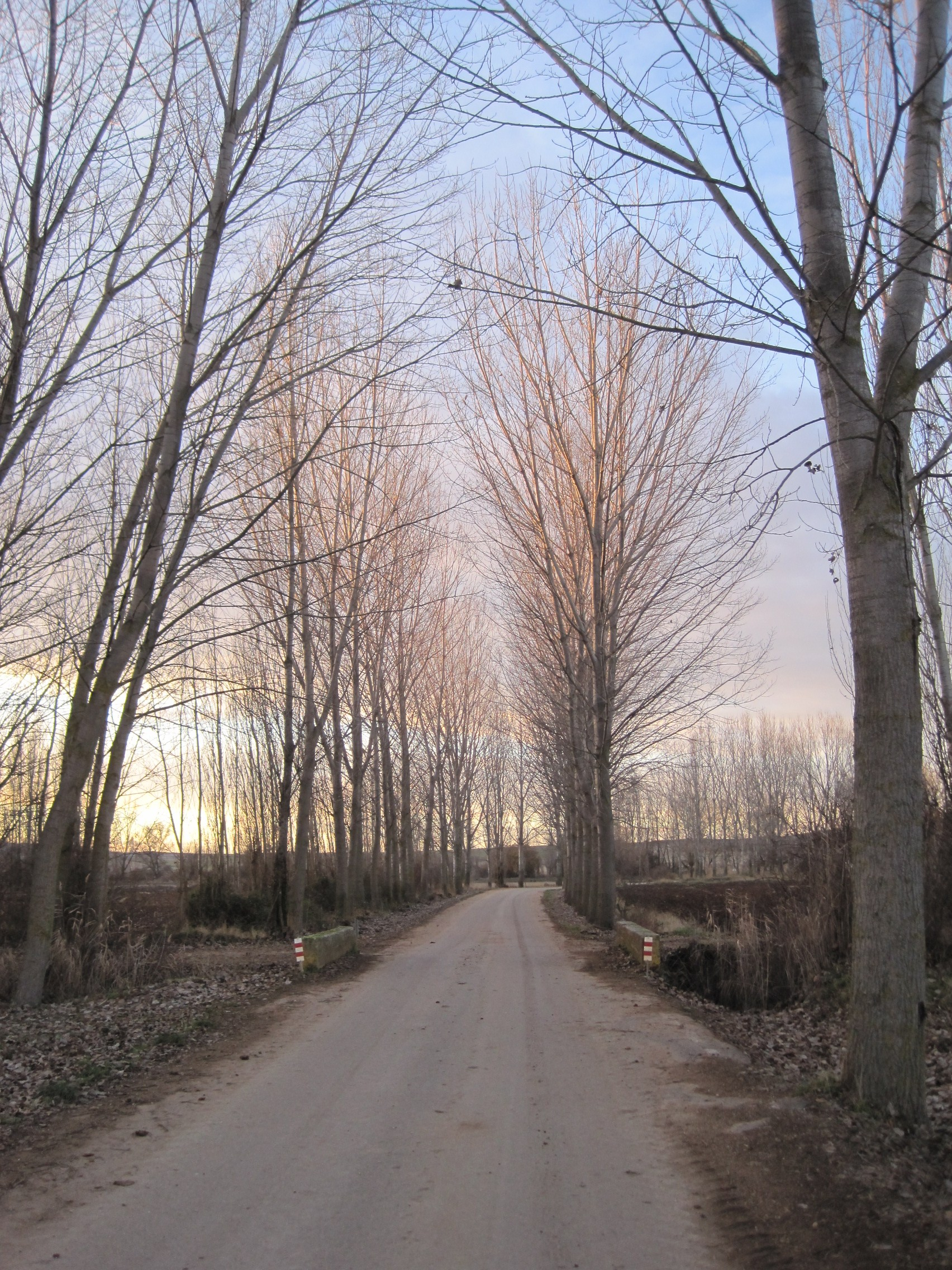 Carretera de acceso a Quintanarraya (Burgos, España) en otoño.